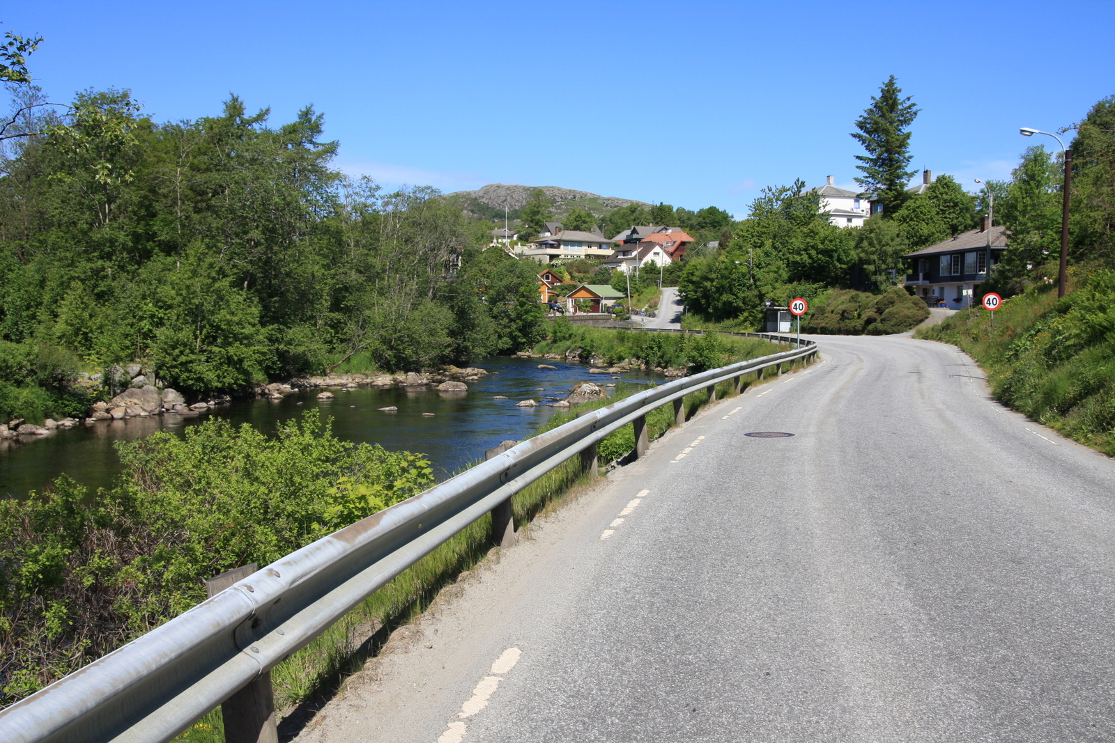 Fylkesvei 220 Figgenveien